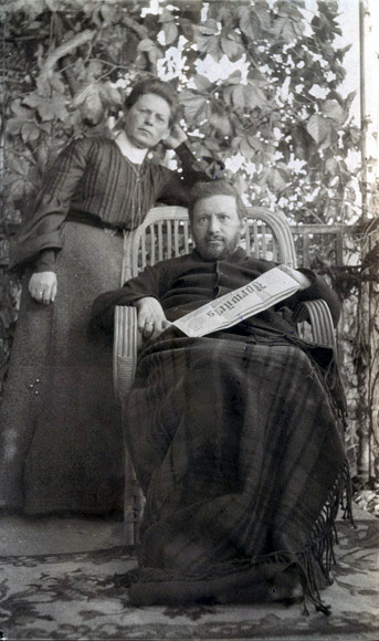 Гоц, Михаил Рафаилович (1866-1906) с женой Верой Самойловной Гассох, читая “Vorwärts” (BG A5/651, из архива Чернов, альбом 4)